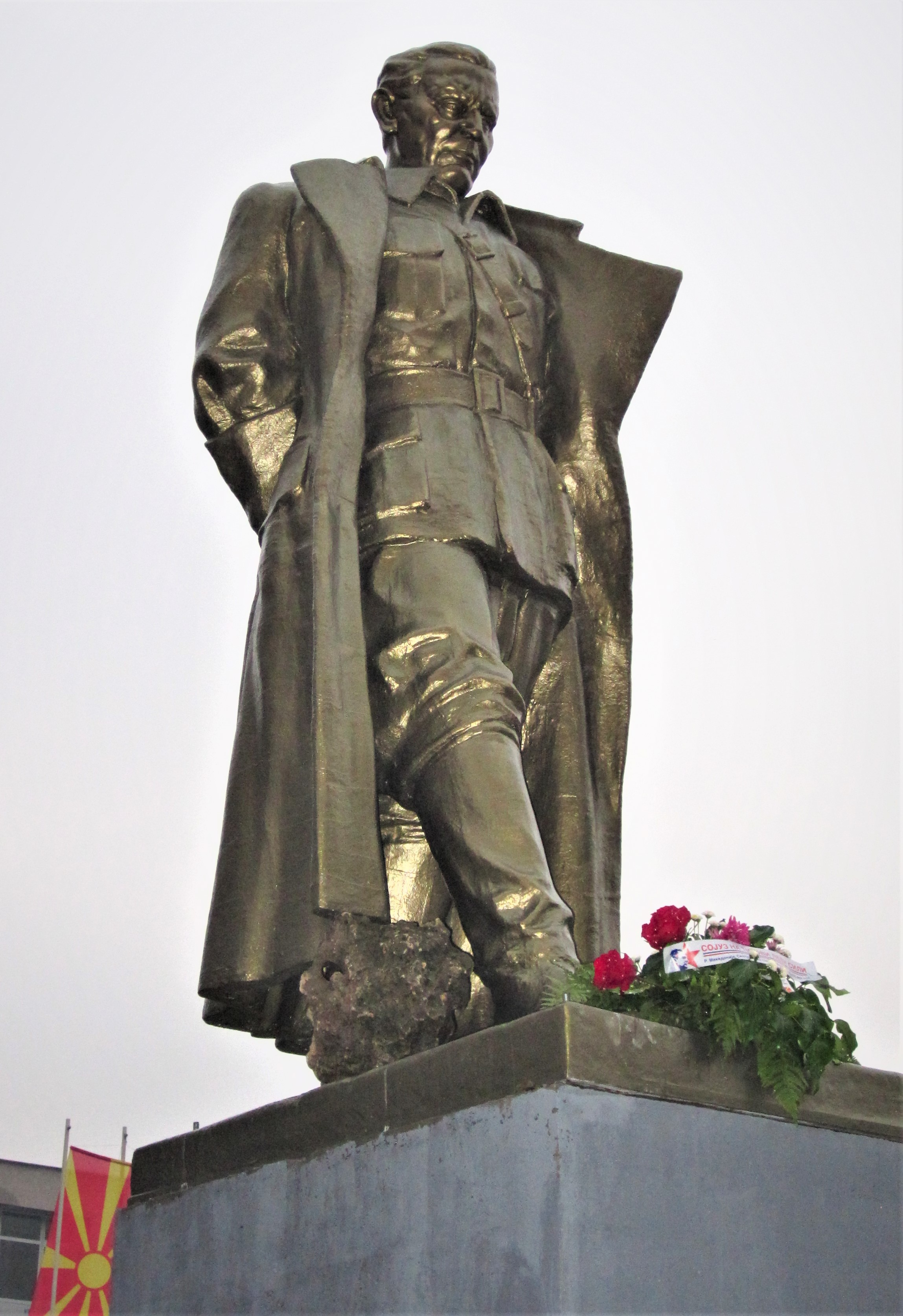 Споменик - Јосип Броз Тито пред гимназијата Јосип Броз Тито - Скопје, поставен 29 ноември 2013.